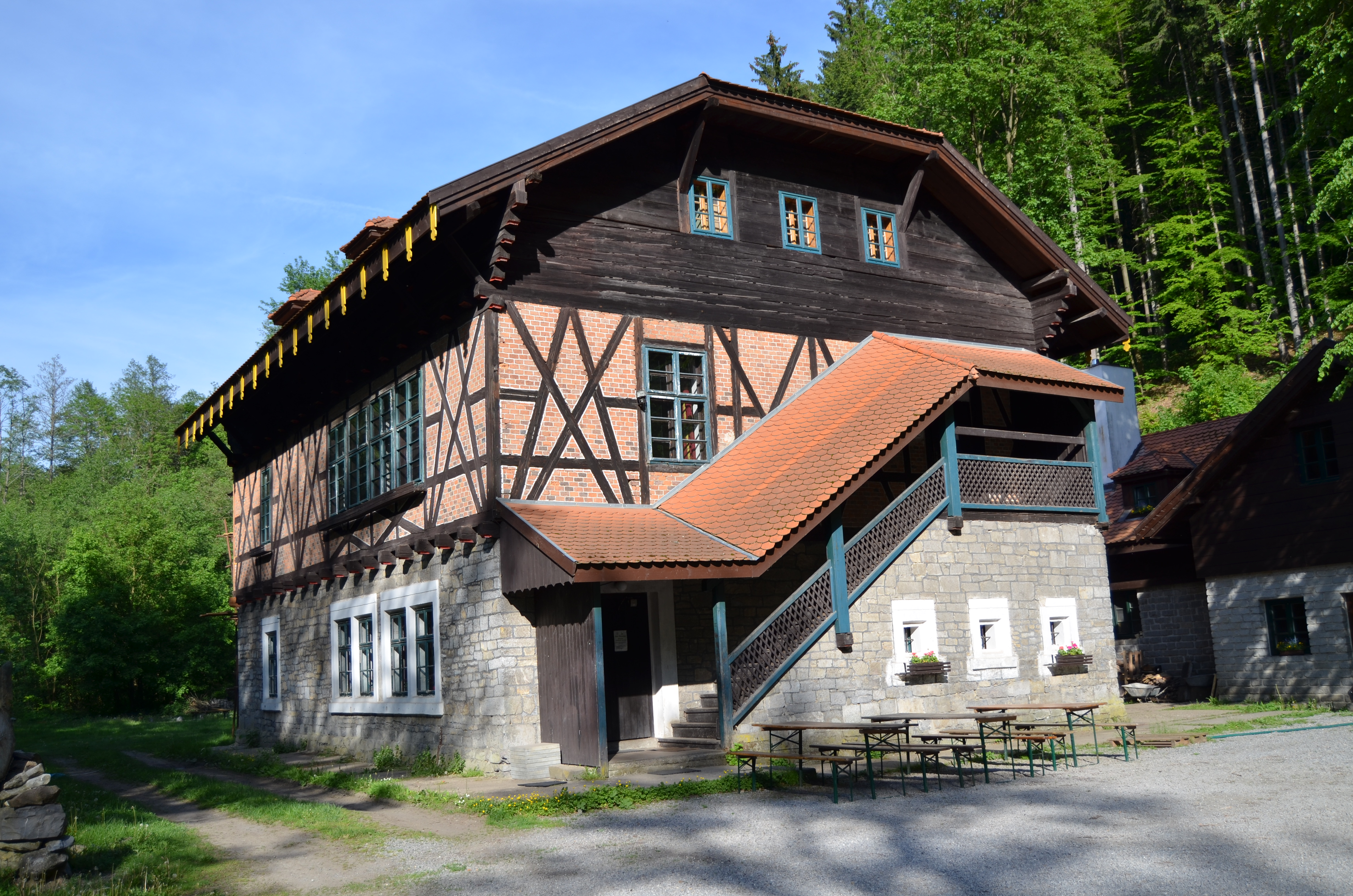 Švýcárna u Františčiny huti v Křtinském údolí